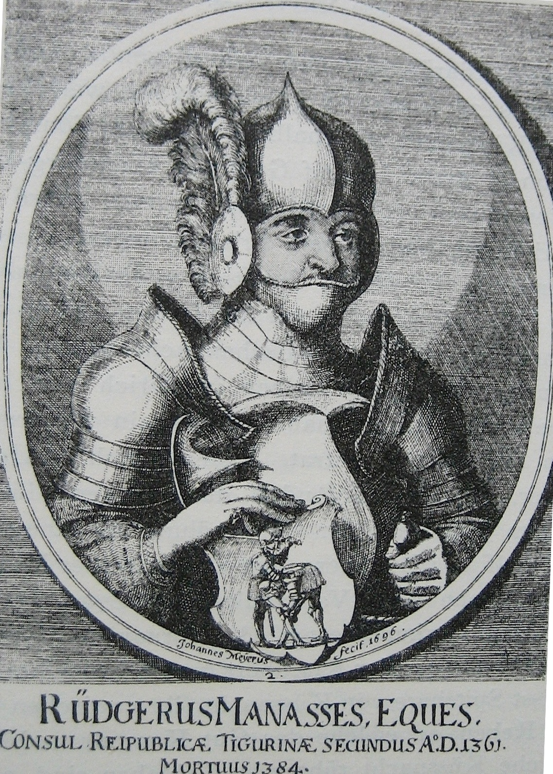 Rüdiger von Manesse, Sohn des Ulrich M. Manegg und der Adelheid von Breitenlandenberg. ∞ Clarita von Hertenberg. Stich von Johannes Meyer von 1696